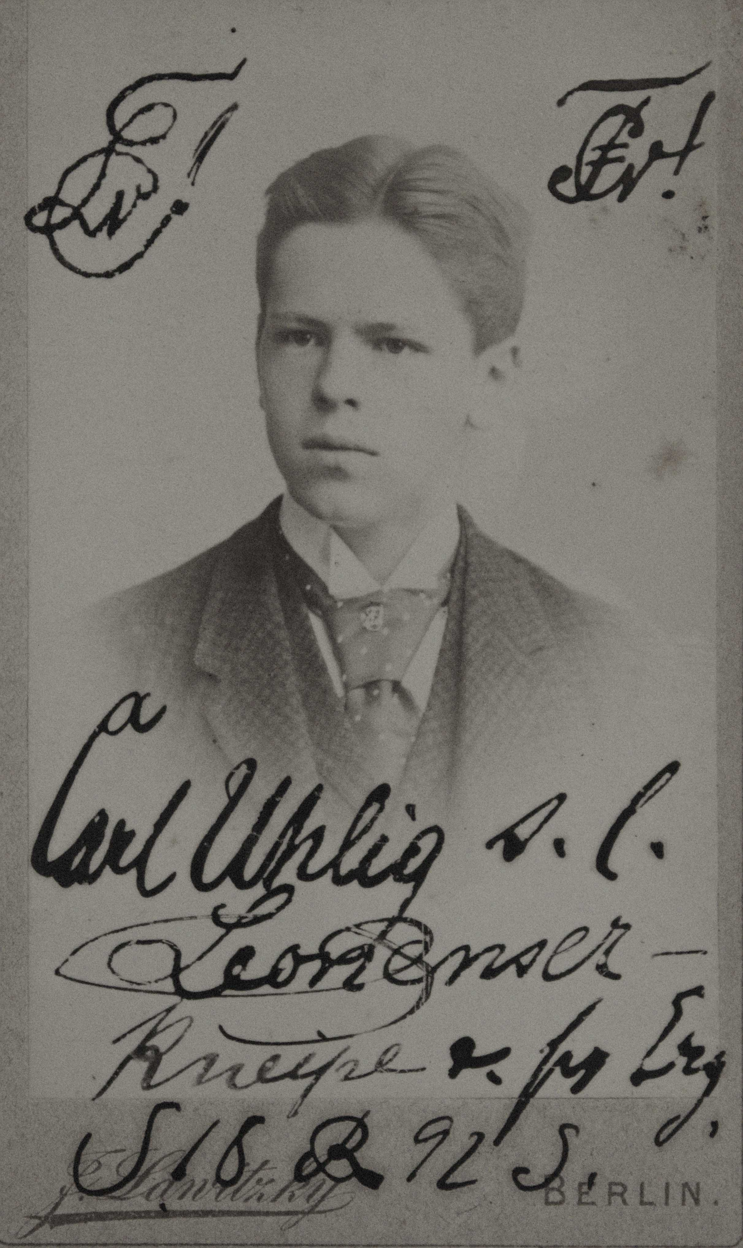 Fotografie von Carl Uhlig als Aktiver der Studentenverbindung Leonensia. Standort: Ahnengalerie im Conventszimmer der Leonensia. Aufgenommen ca. 1892. Beschreibung: Oben links befindet sich der Zirkel der Verbindung Leonensia. Oben rechts der Zirkel einer weiteren Verbindung. Text unten: "Carl Uhlig s.[einer] l.[ieben] Leonensia-Kneipe z.[um] fr[eudi]g[en] Er[ei]g[nis]. S[ommer] 18 R[uperto Carola] 92 S[emester]